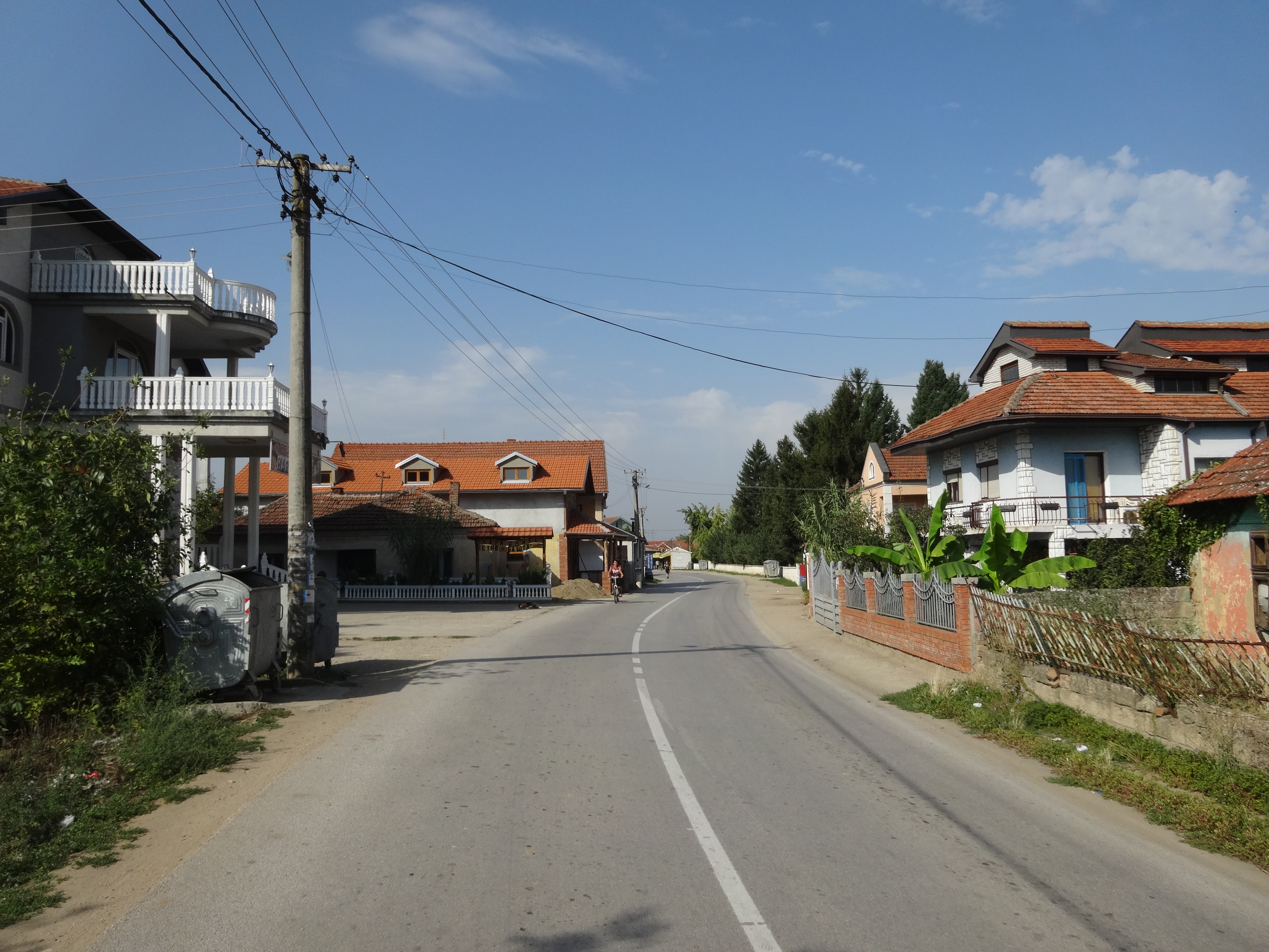 Manojlovce, Leskovac